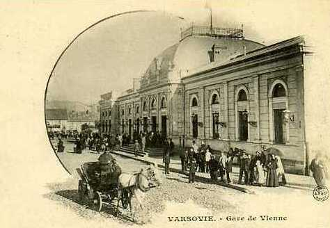 Warszawa, Nowa Poczekalnia (dworzec Wiedeński), arch. Czesław Domaniewski, 1900